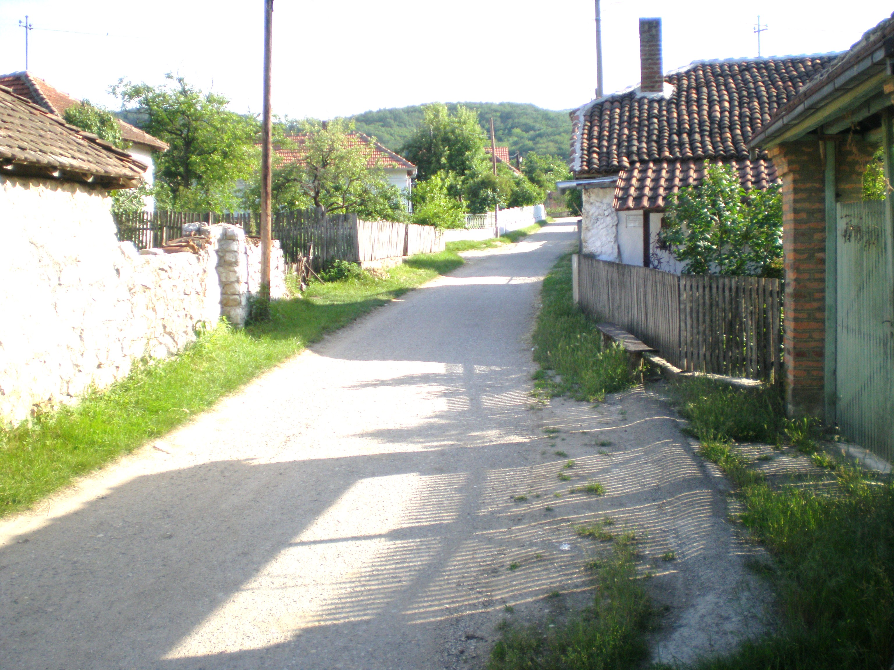 Доња Мала у селу Рибаре код Жагубице.